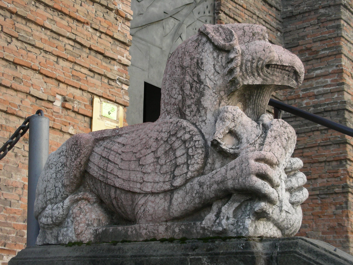 Padova, chiesa di Santa Giustina, esterno, scultura di grifone all'ingresso, sinistra